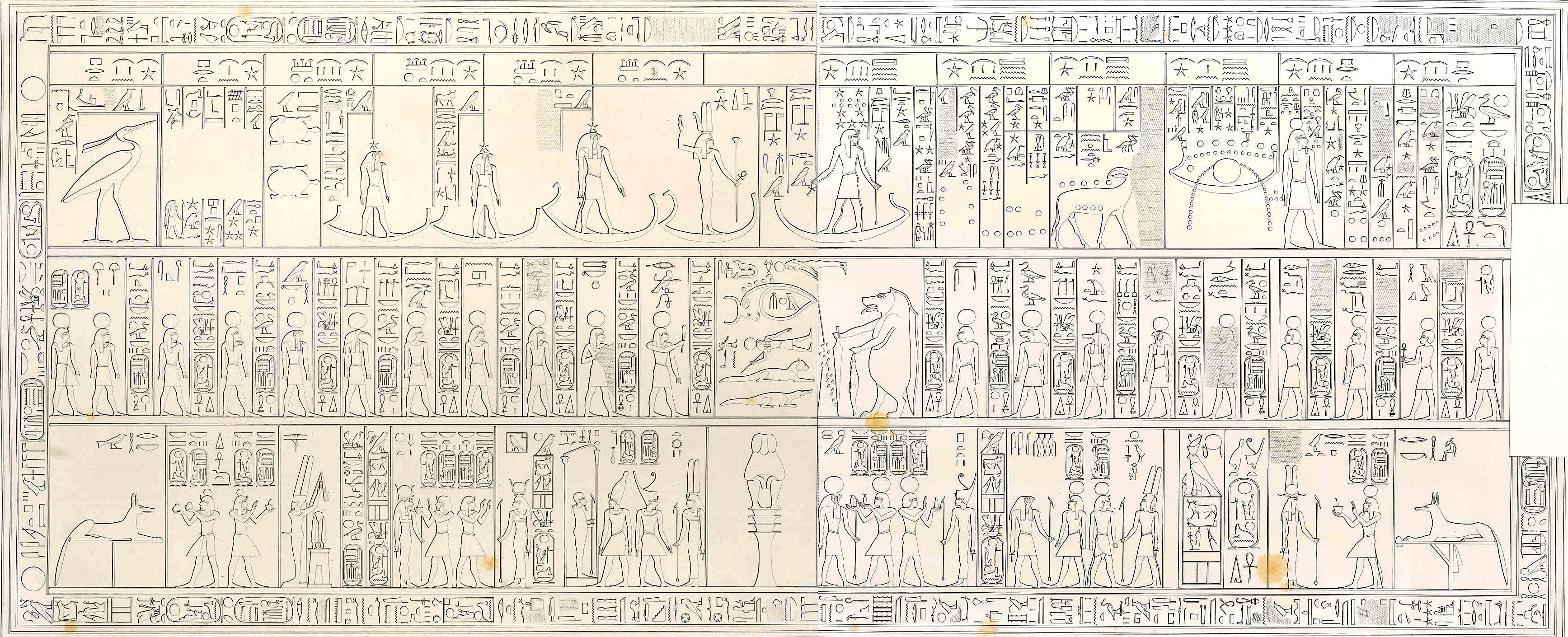 Inscriptions astronomiques du temple de Ramsès II